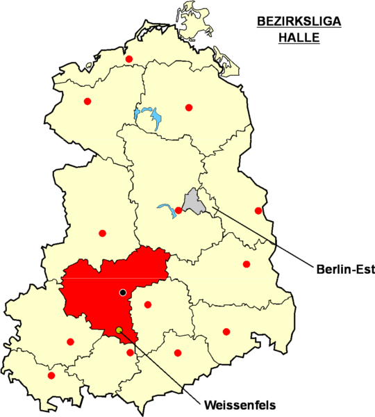 Localisation de Weissenfels dans la "Bezirksliga Halle" à l'époque de la RDA Catégorie:Logo de clubs de football - Allemagne